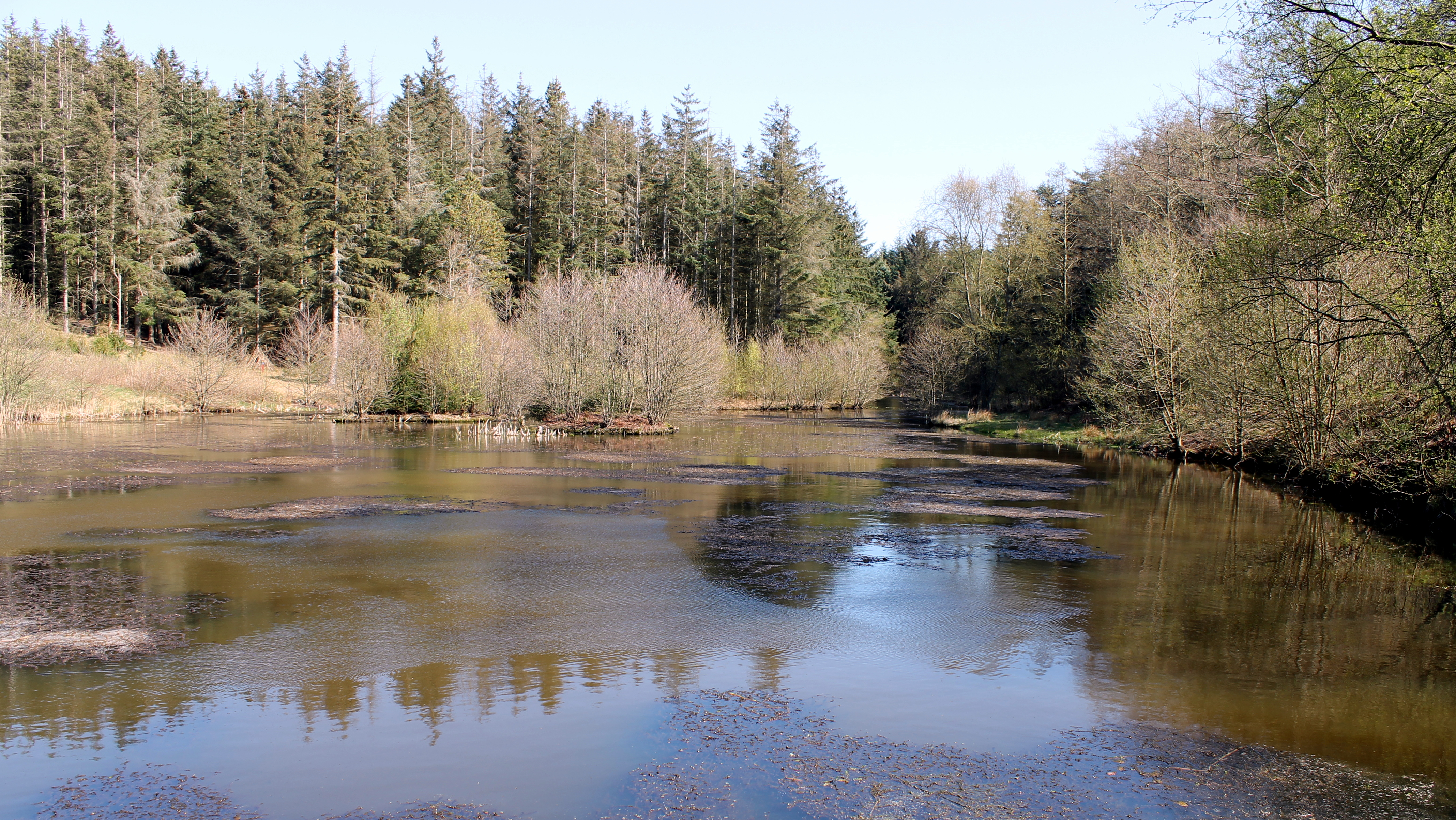 Horsedammen i Tornby Klitplantage